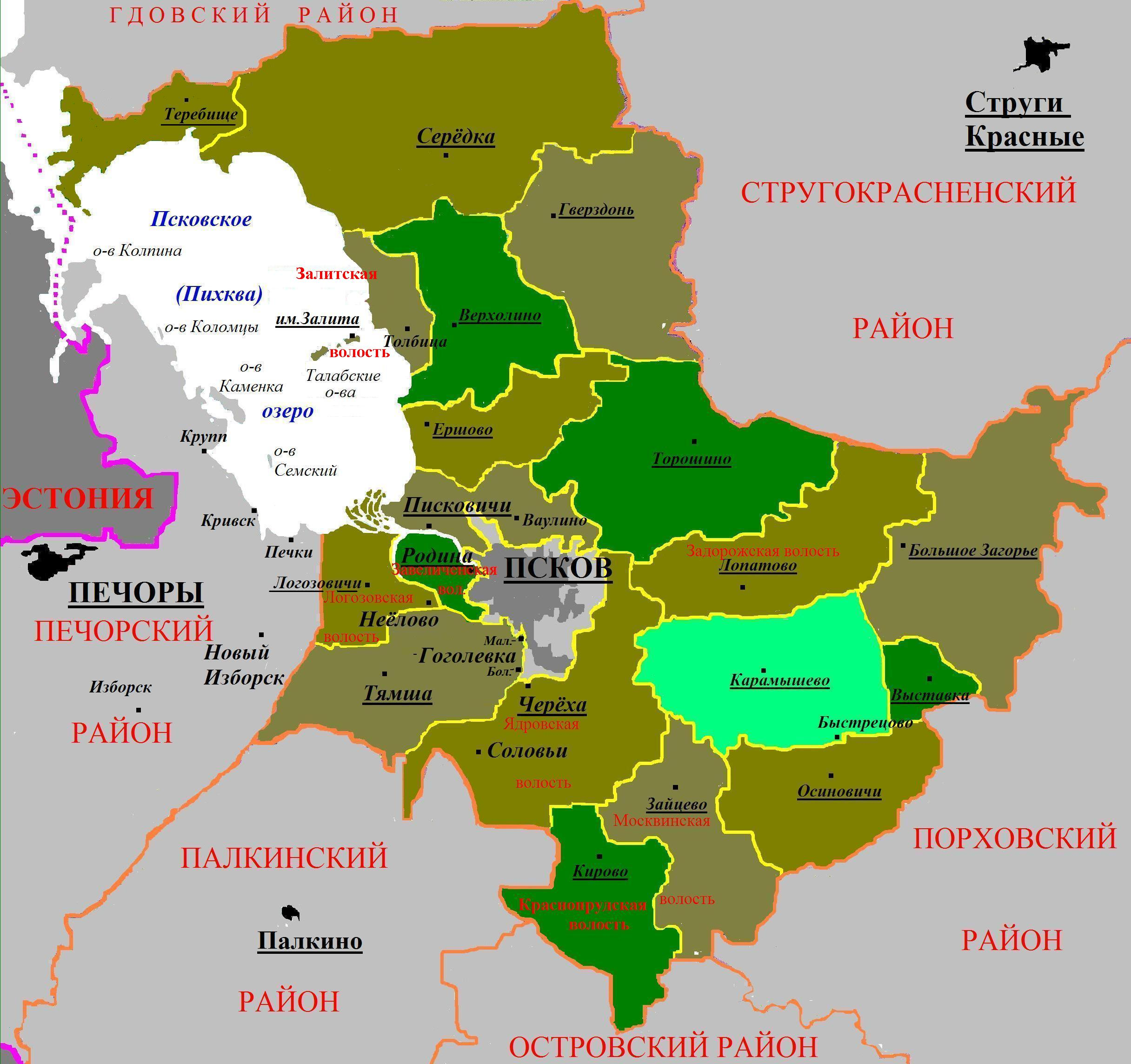 Административная карта Псковского района Псковской области до 2005 г.